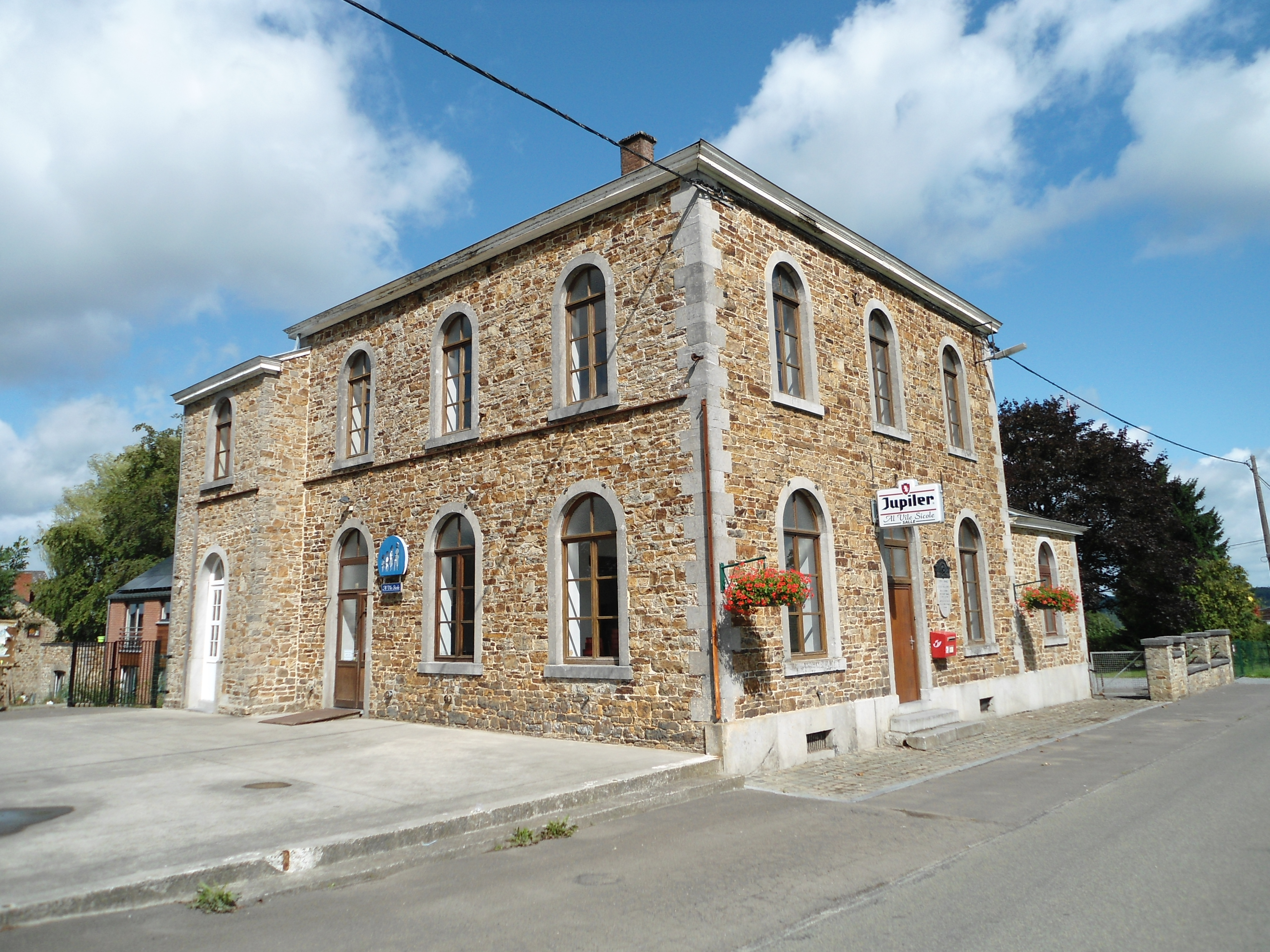 Ernonheid ancienne école